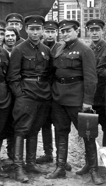 руководства и начальников крупных лагерей ГУЛАГ. (Матвей Давидович Берман, Семён Григорьевич Фирин и др.)